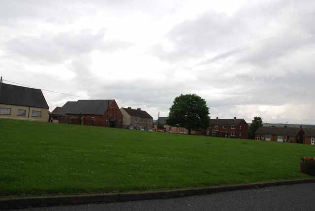 The village green, Byers Green, County Durham